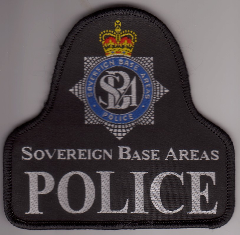 SBA police patch